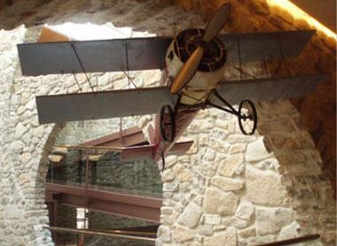 Espai pedals del Museu